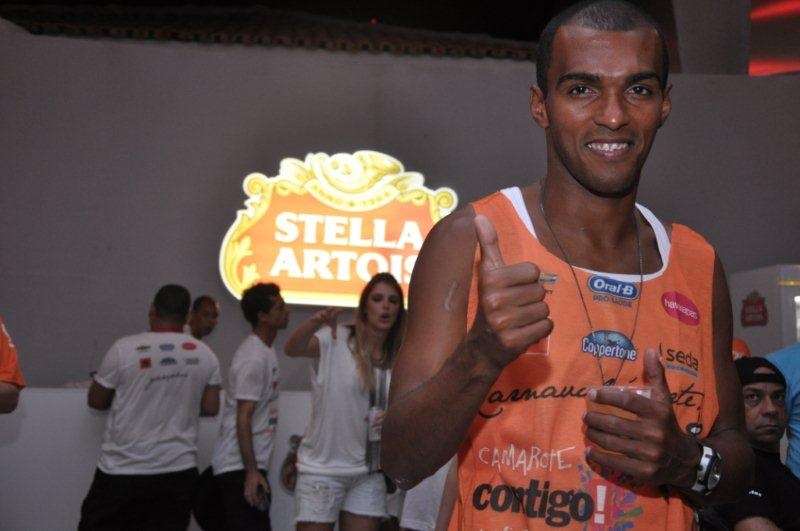 Foto: Divulgação - Reprodução permitida para a imprensa